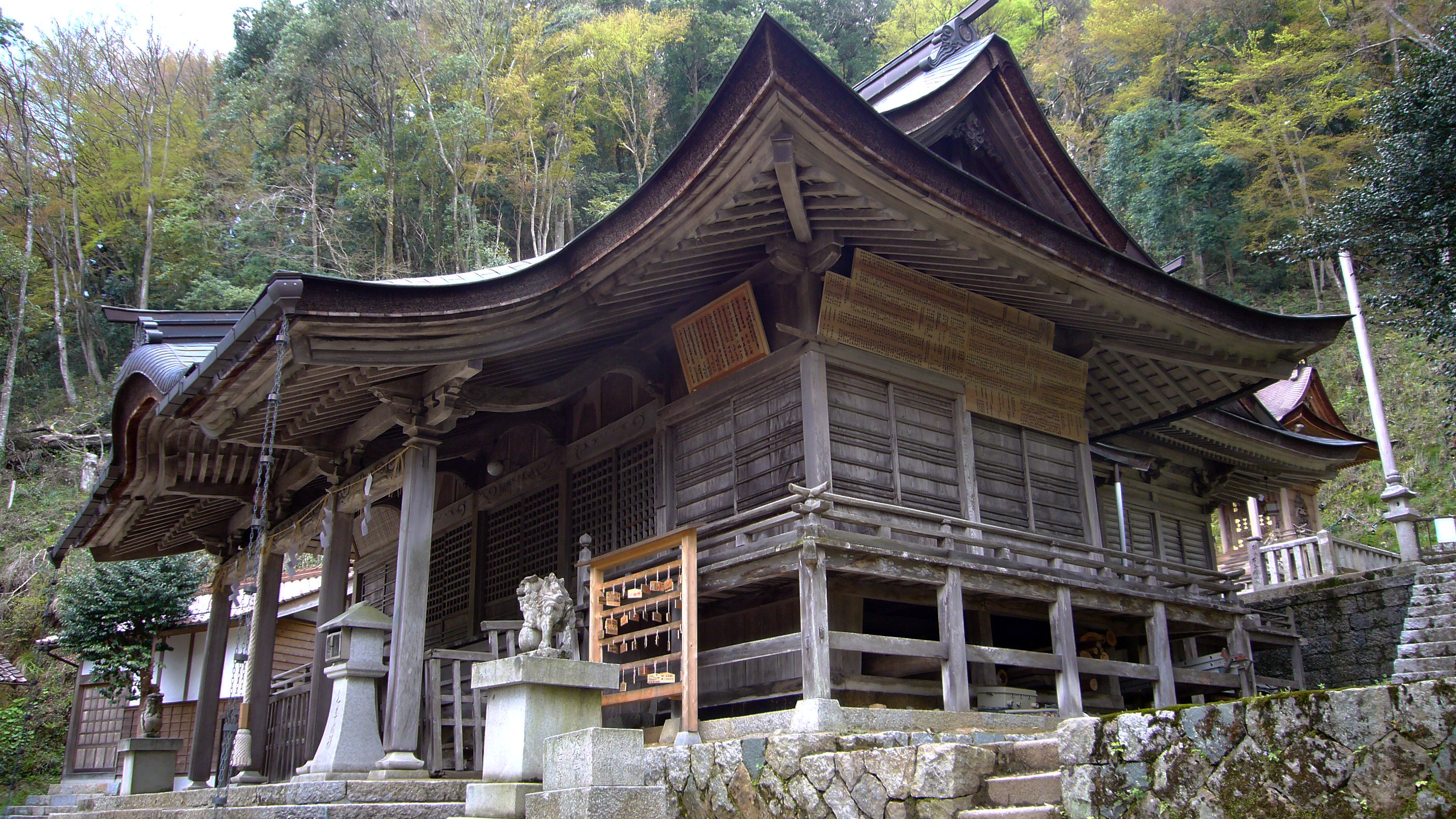 Suwa-jinja in Chidu-cho, Tottori prefecture, Japan